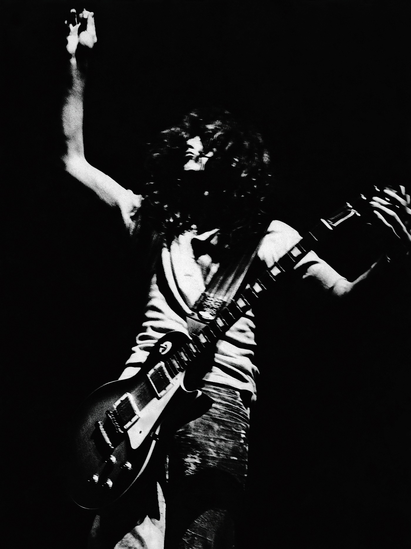 Photo prise lors du 1er concert de Led Zeppelin à l'Olympia de Paris en octobre 1969